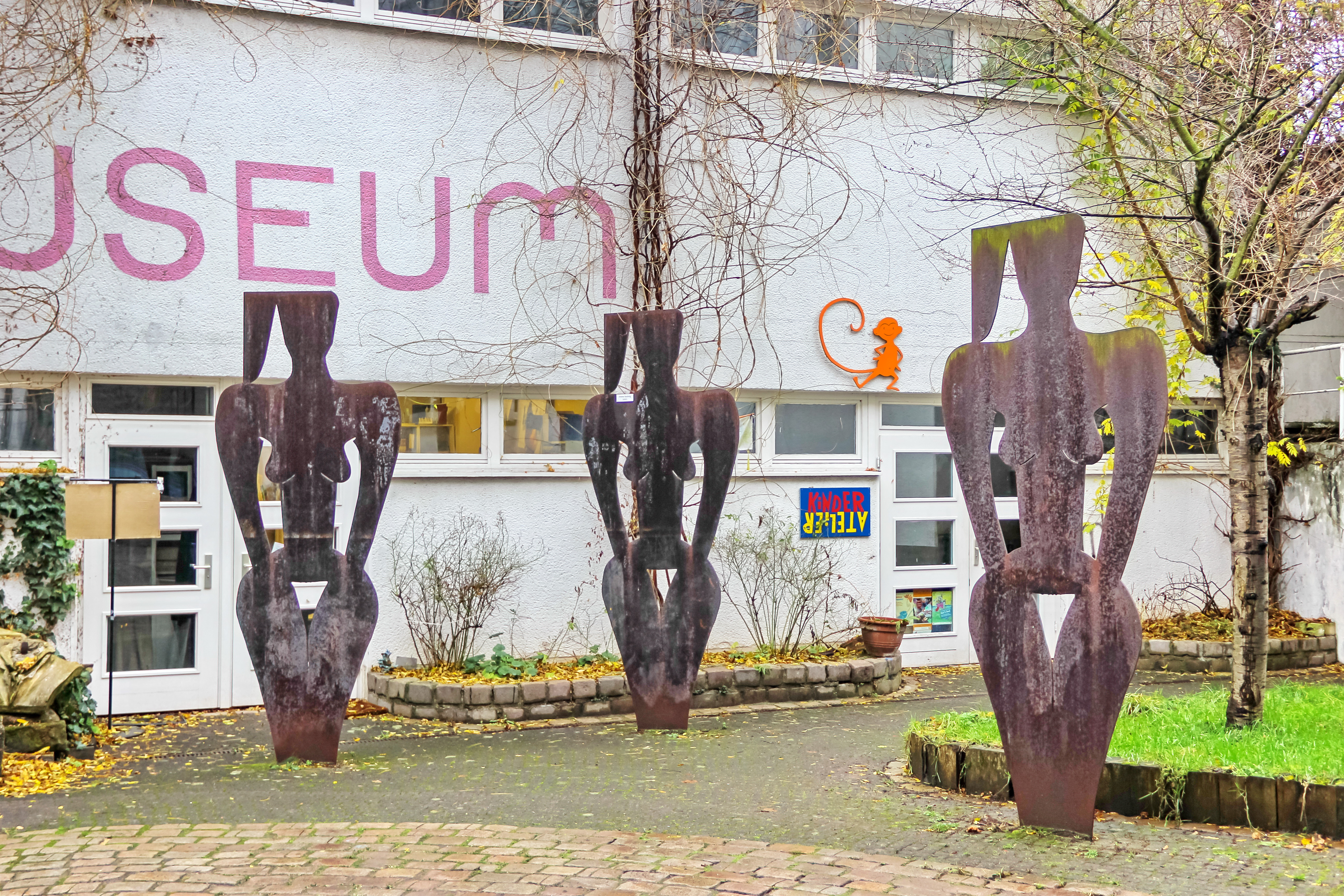 Skulpturen vor dem Bonner Frauenmuseum.